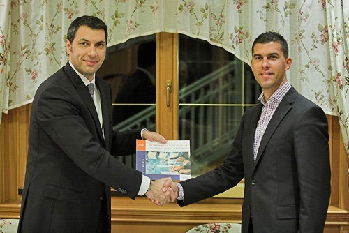 Lázár János és Mihalovics Péter